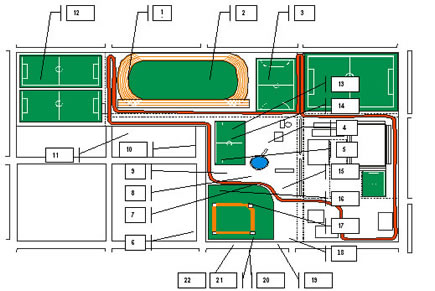 Centro Recreativo y Deportivo Municipal Gorki Grana emplazado en en ex centro de detención ilegal Mansión Seré - Municipio de Morón